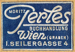 Logo vom Verlag Moritz Perles